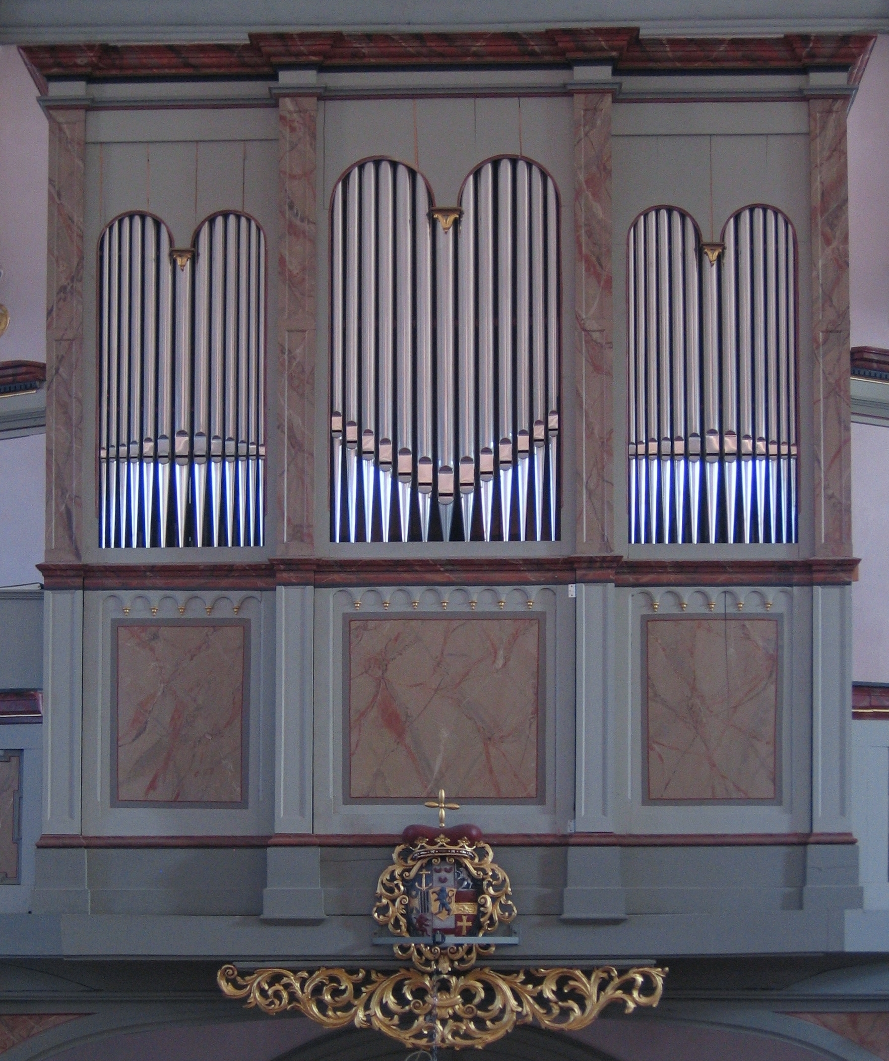 Orgel der Evangelisch-reformierten Kirche in Wölfersheim. Mit freundlicher Genehmigung der Kirchengemeinde.